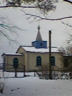 Каплиця с. Ясинець